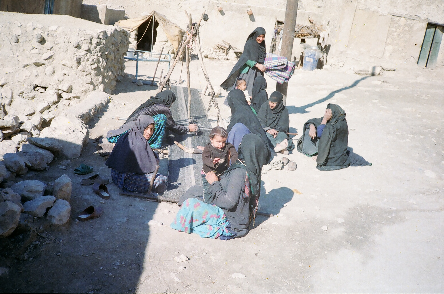 زنان روستای کفکشنان که در حال بافتن شله shala هستند. شله دارای دو لنگ است که بر روی الاغ می گذارند. و مشک یا بار را در درون آن قرار می دهند.